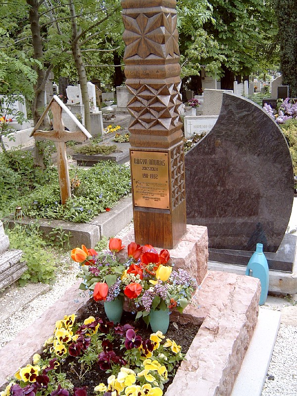 Bágya András (1911. december 8. - 1992. november 4.) zeneszerző sírja Budapesten. Farkasréti temető: 25-4-61/1